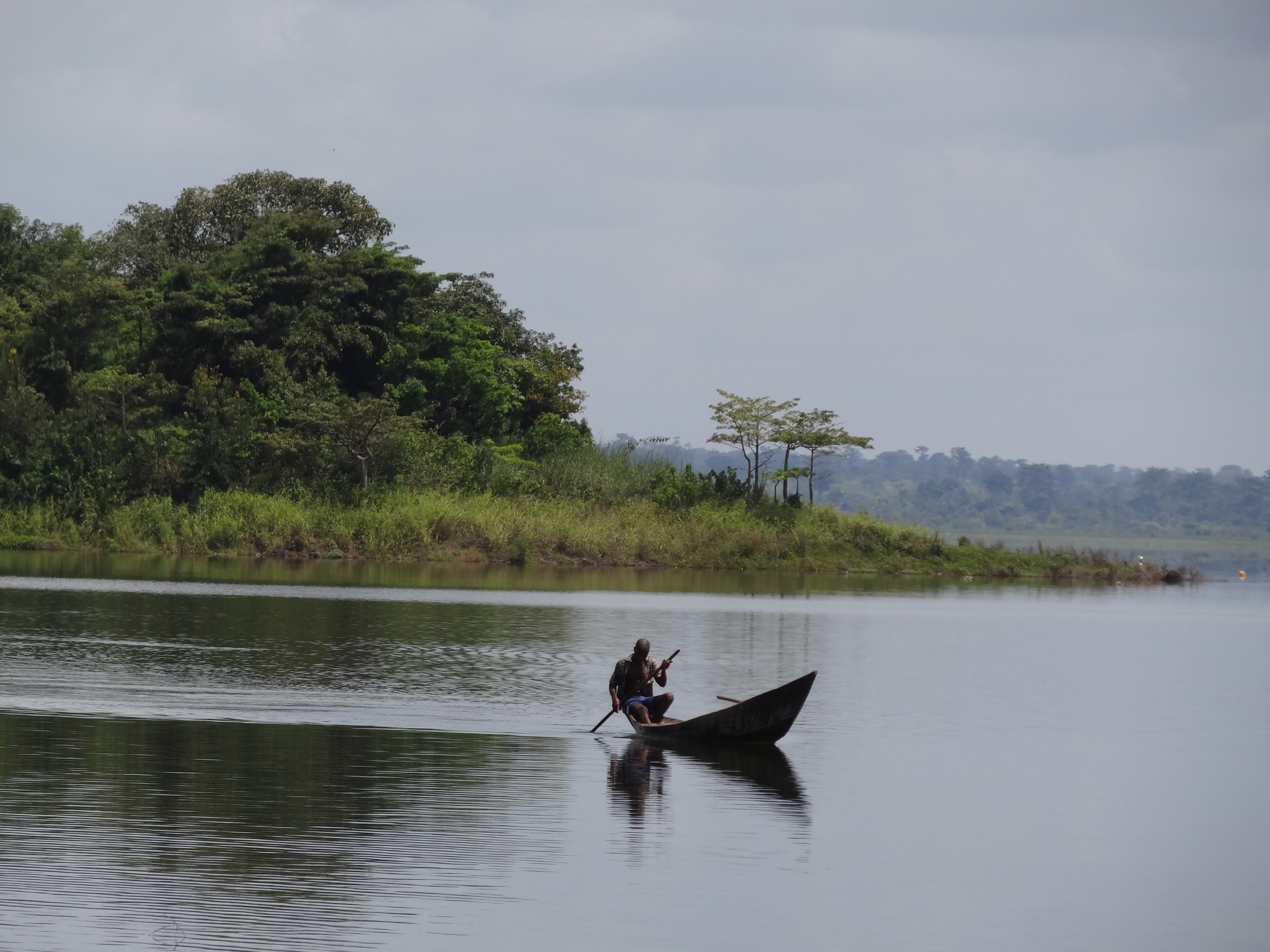 דייג באגם קוסו ליד סכר קוסו בחוף השנהב This is an image of food from Ivory Coast